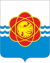 Герб города Десногорск, смоленская область, Россия